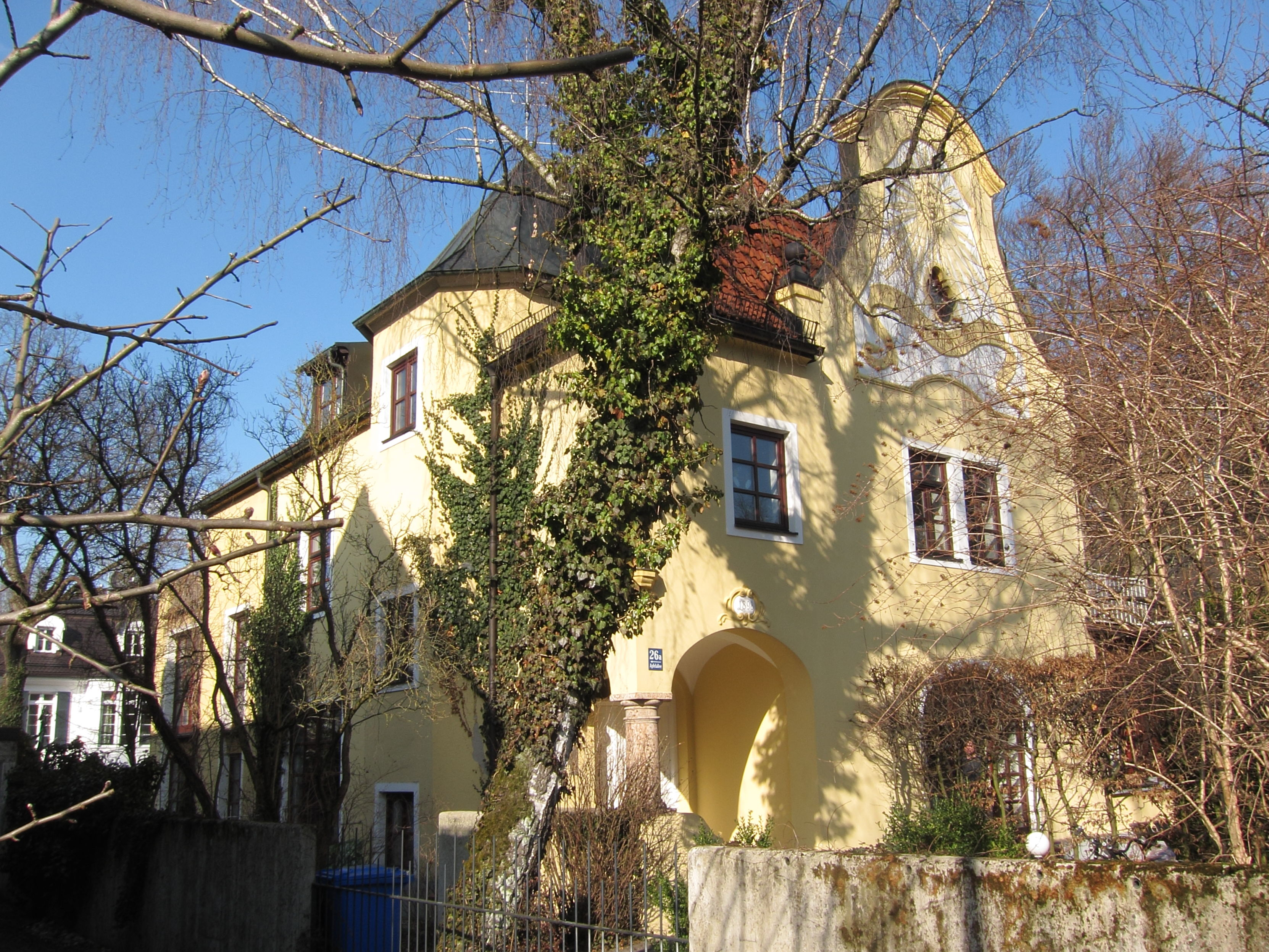 Apfelallee 26 a; Villa, barockisierend, Giebelfeld mit Stucksonnenuhr, um 1897/98, aus dem Büro August Exter.